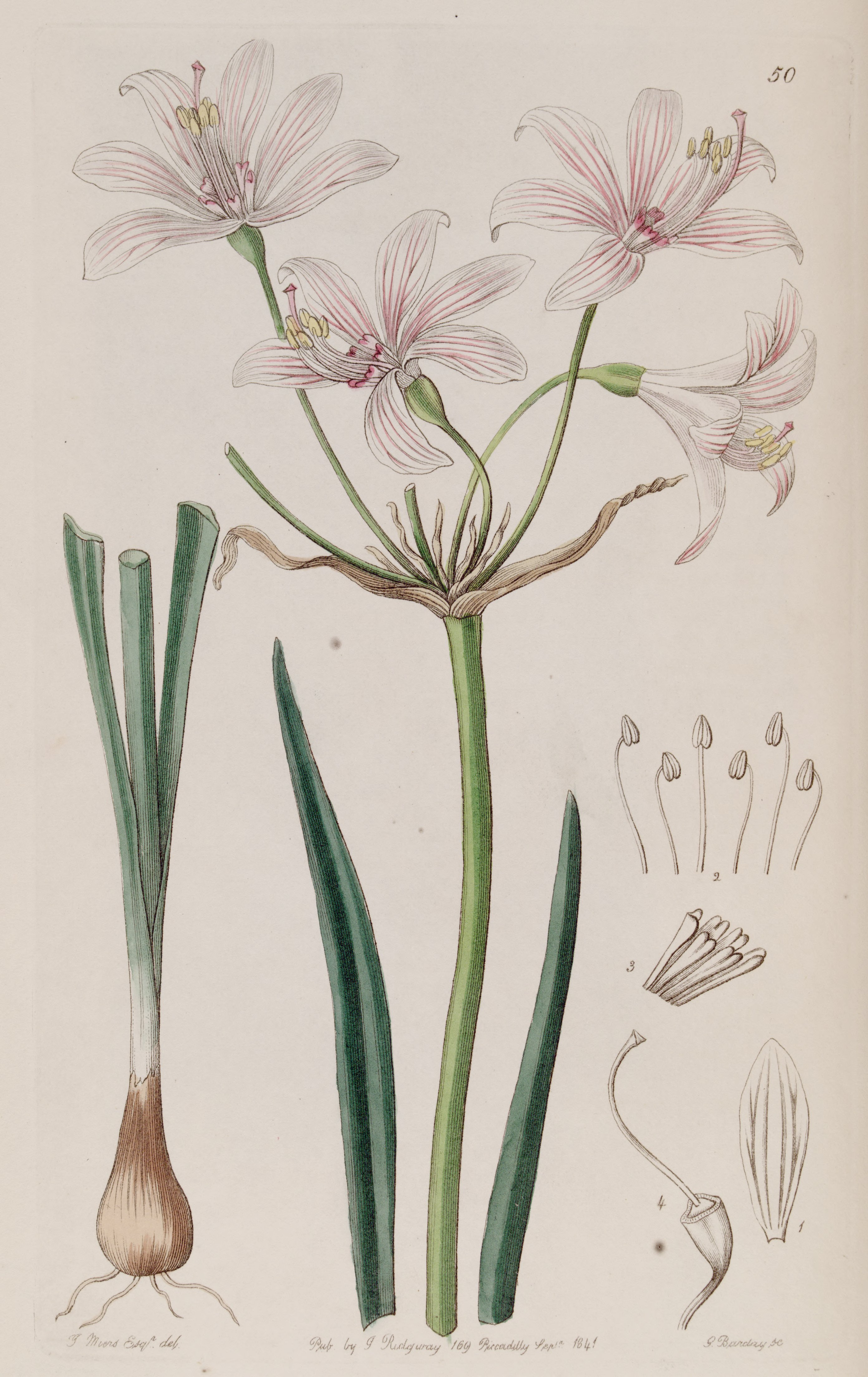 Placea ornata